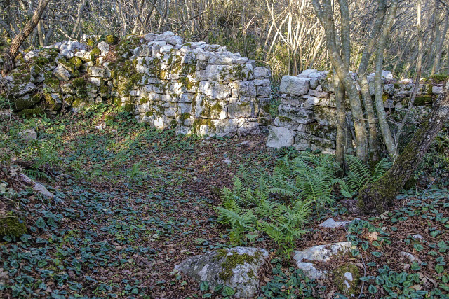 Il villaggio distrutto di San Severo, San Marco dei Cavoti (BN)